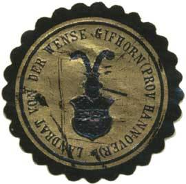 Sealing stamp Title: LANDRAT VON DER WENSE GIFHORN (PROV. HANNOVER) = Landrat Ludwig von der Wense, Gifhorn (Provinz Hannover) Description: schwarz, gold Place: Gifhorn size: cm